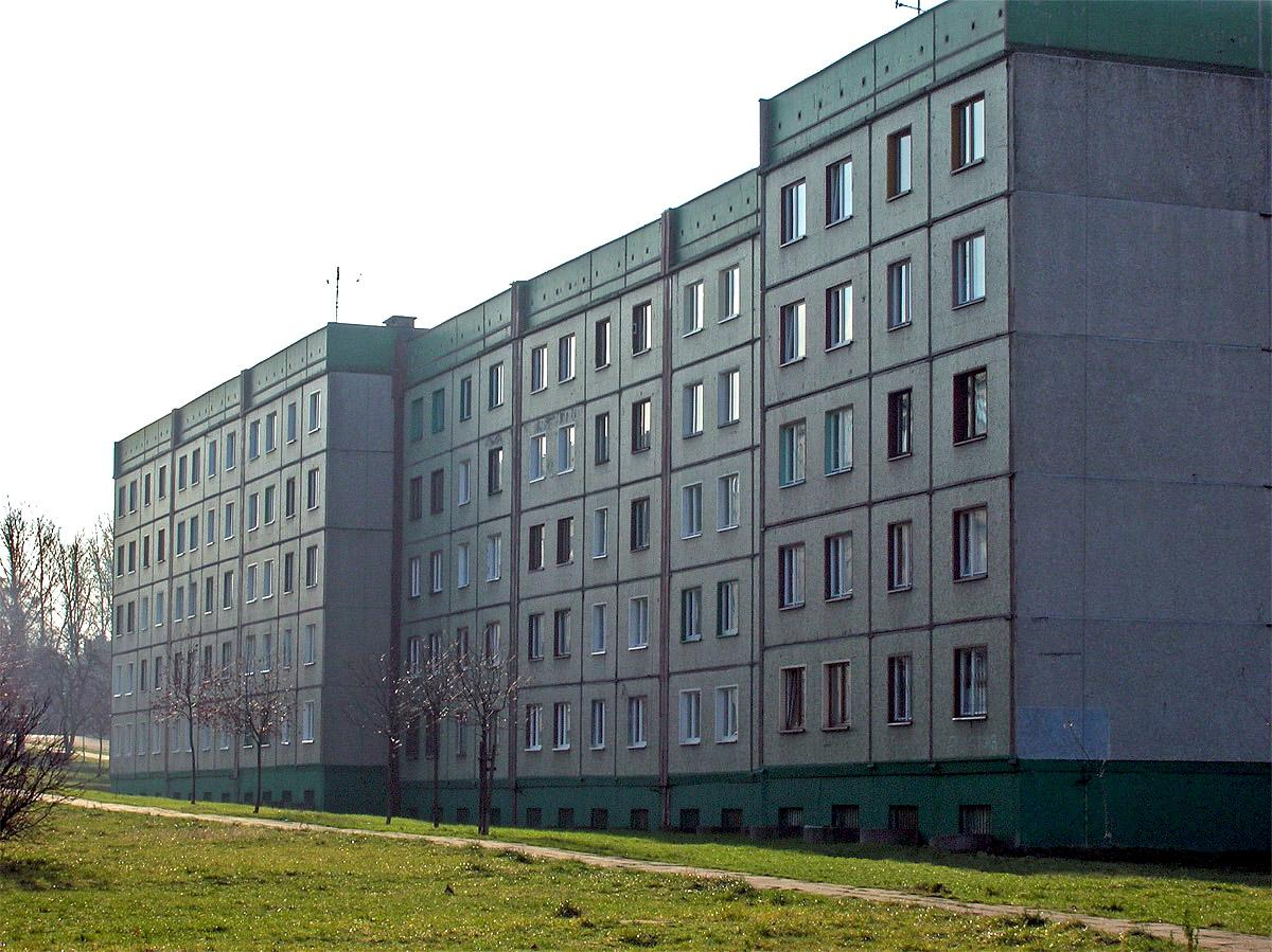 Zdjęcie przedstawia jeden z bloków mieszkalnych na ulicy 15-go grudnia w dzielnicy Ksawera